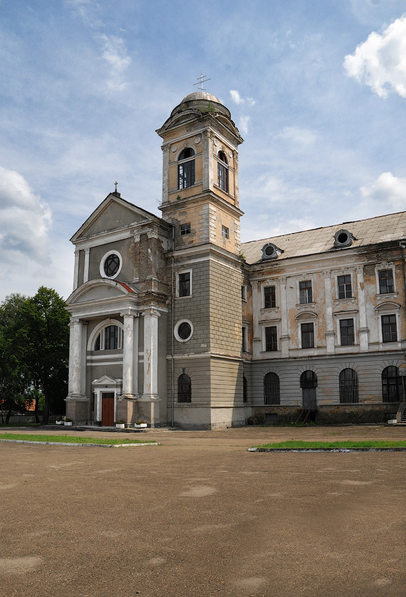 Хирівський Конвікт